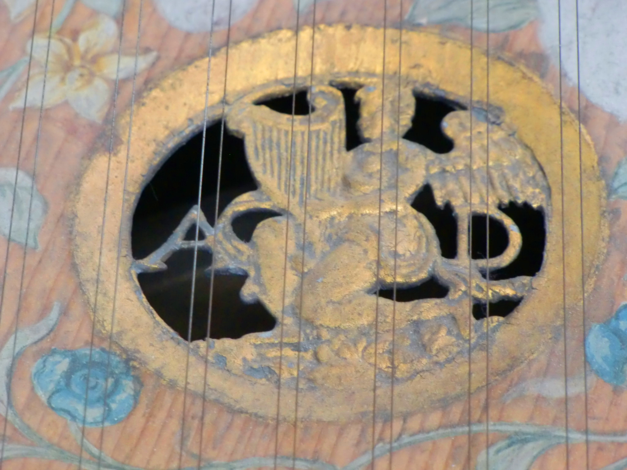 Rosace du clavecin Albert Delin (Tournai, 1750) - Berlin, Musikinstrumentenmuseum